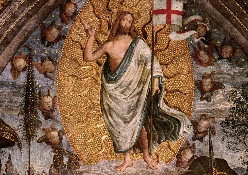 PINTURICCHIO The Resurrection Fresco Palazzi Pontifici, Vatican